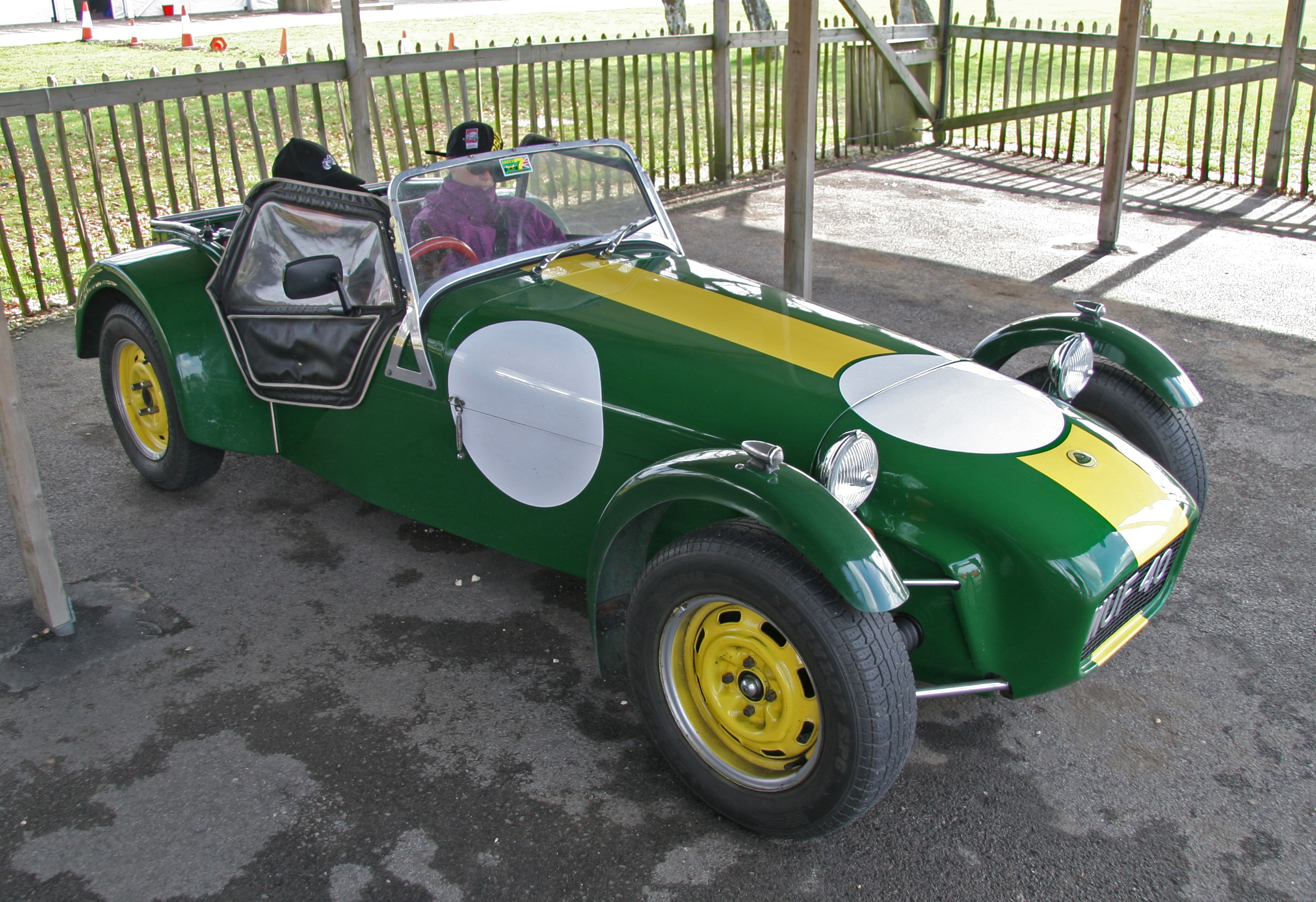 Lotus 7